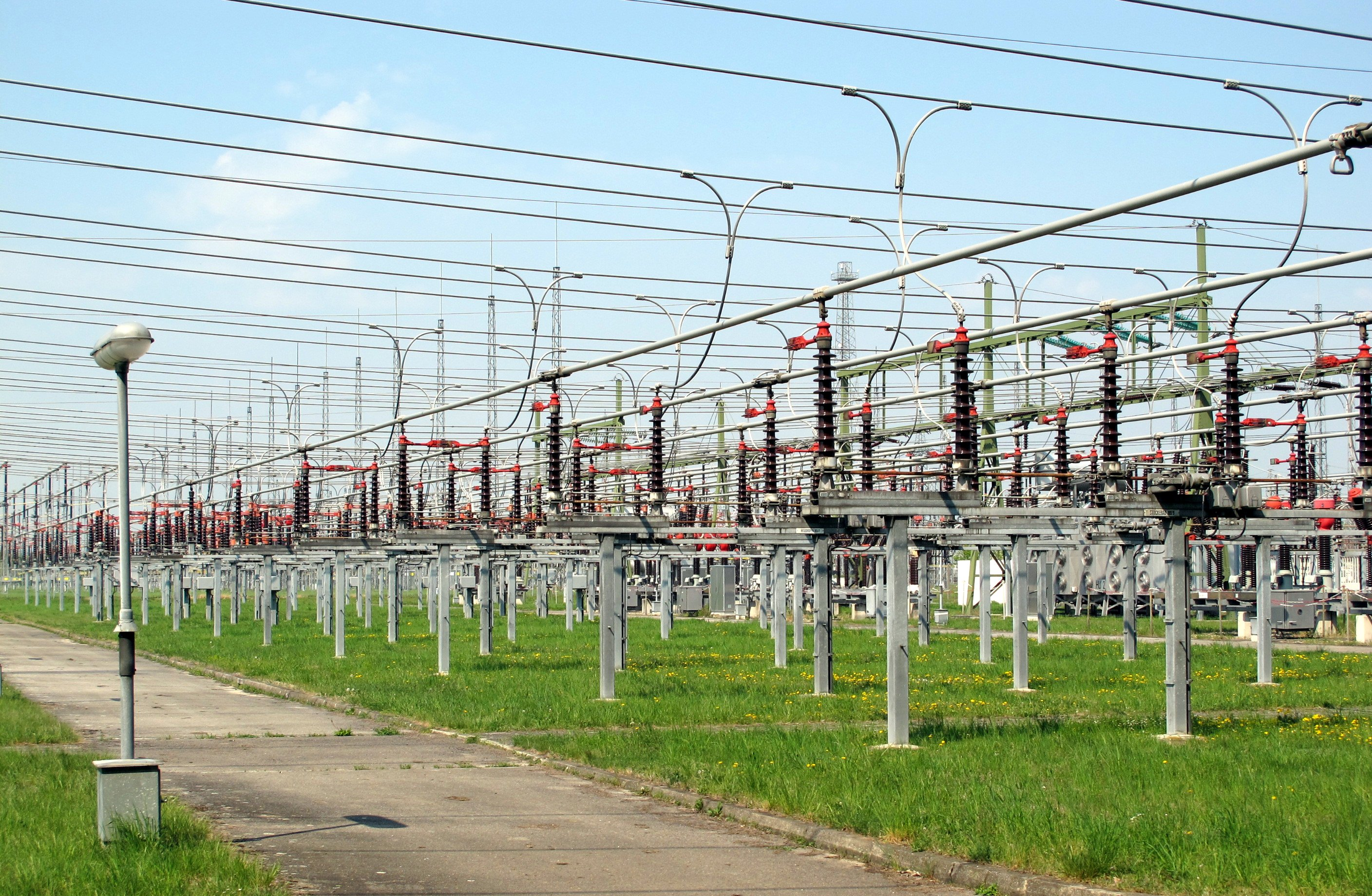 Umspannwerk Dürnrohr; Freiluftschaltfeld für 110 kV, Reihe von Drehtrennschaltern und Sammelschienen